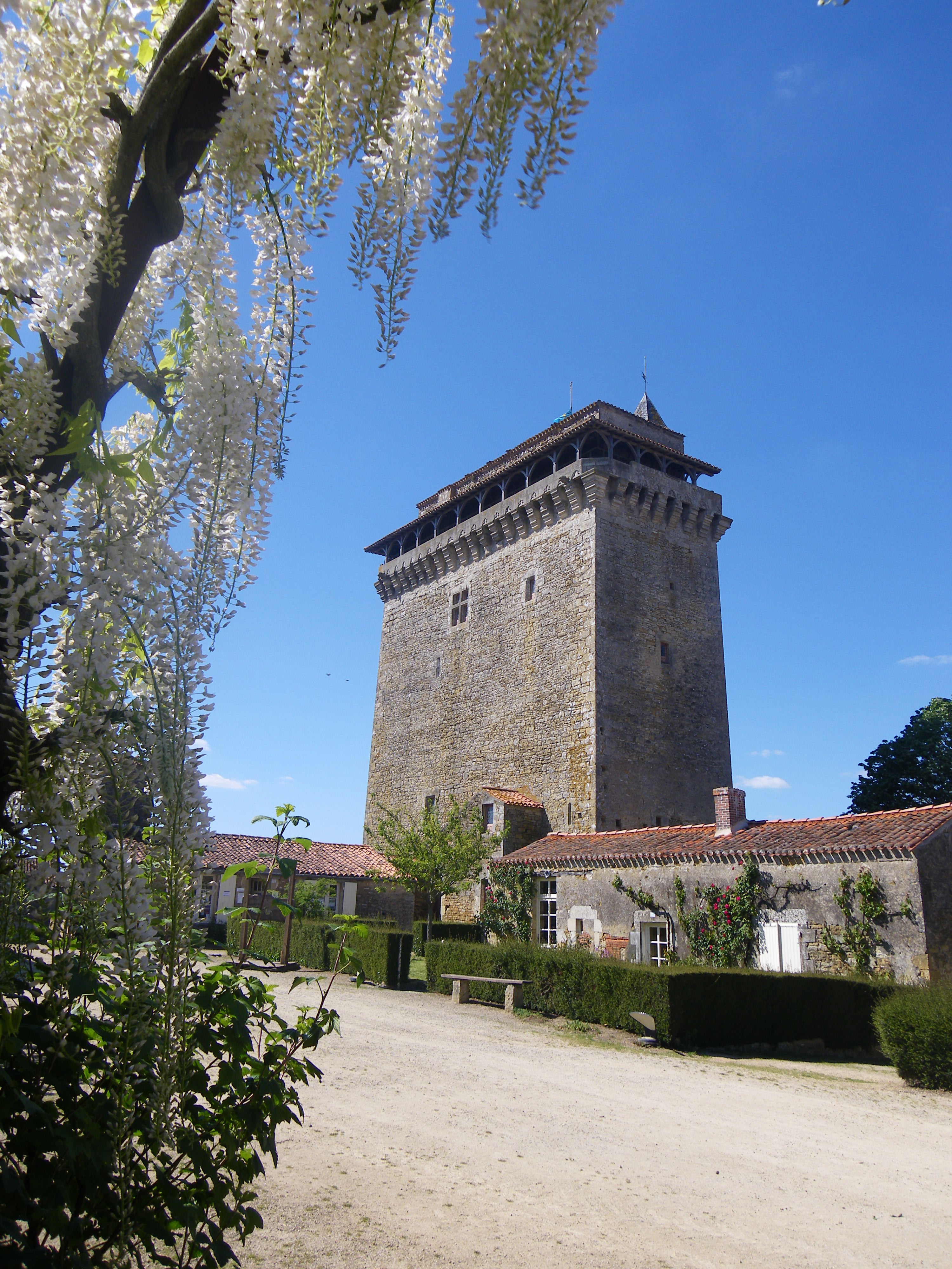 Donjon du XIVème siècle